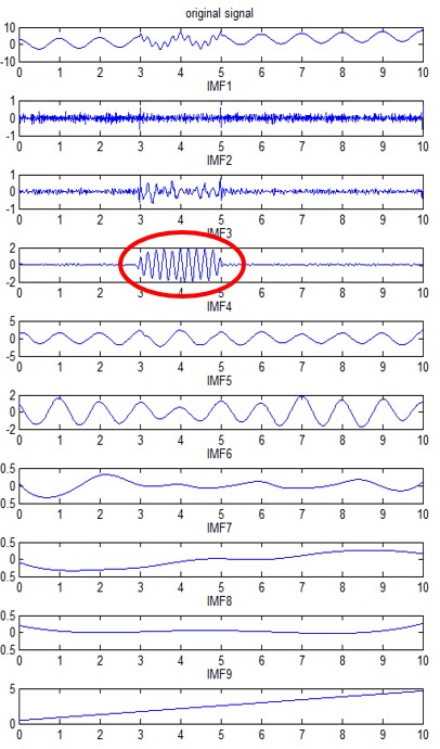 EEMD的模擬 N=100 std=0.2